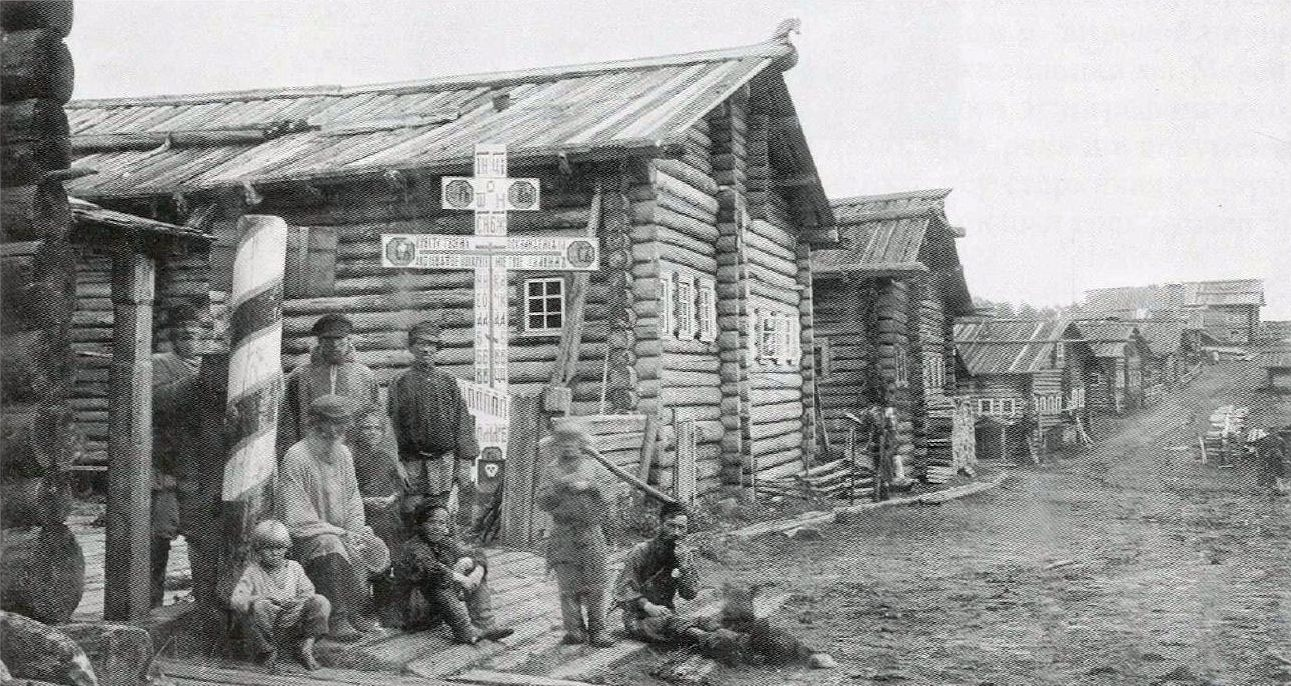 Крестьяне деревни Юромы Мезенского уезда. Начало ХХ века.